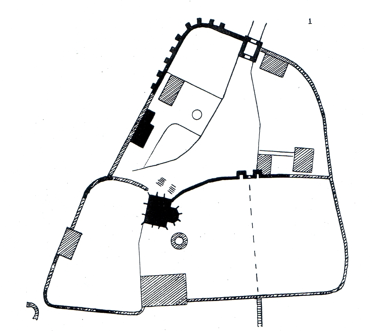 Burg Stromberg (Oelde) mit der Kreuzkirche